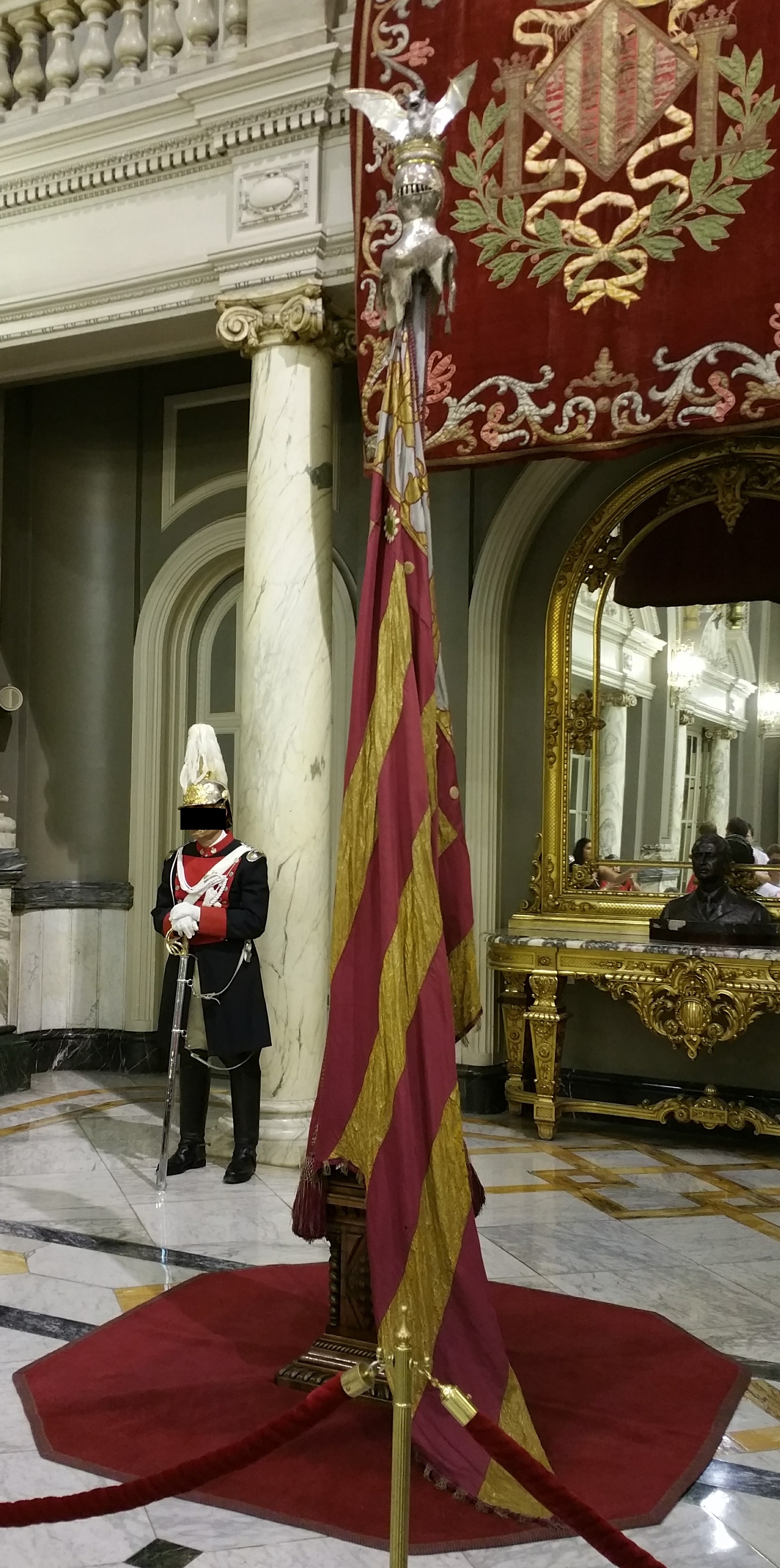 Señera expuesta en el Ayuntamiento de Valencia